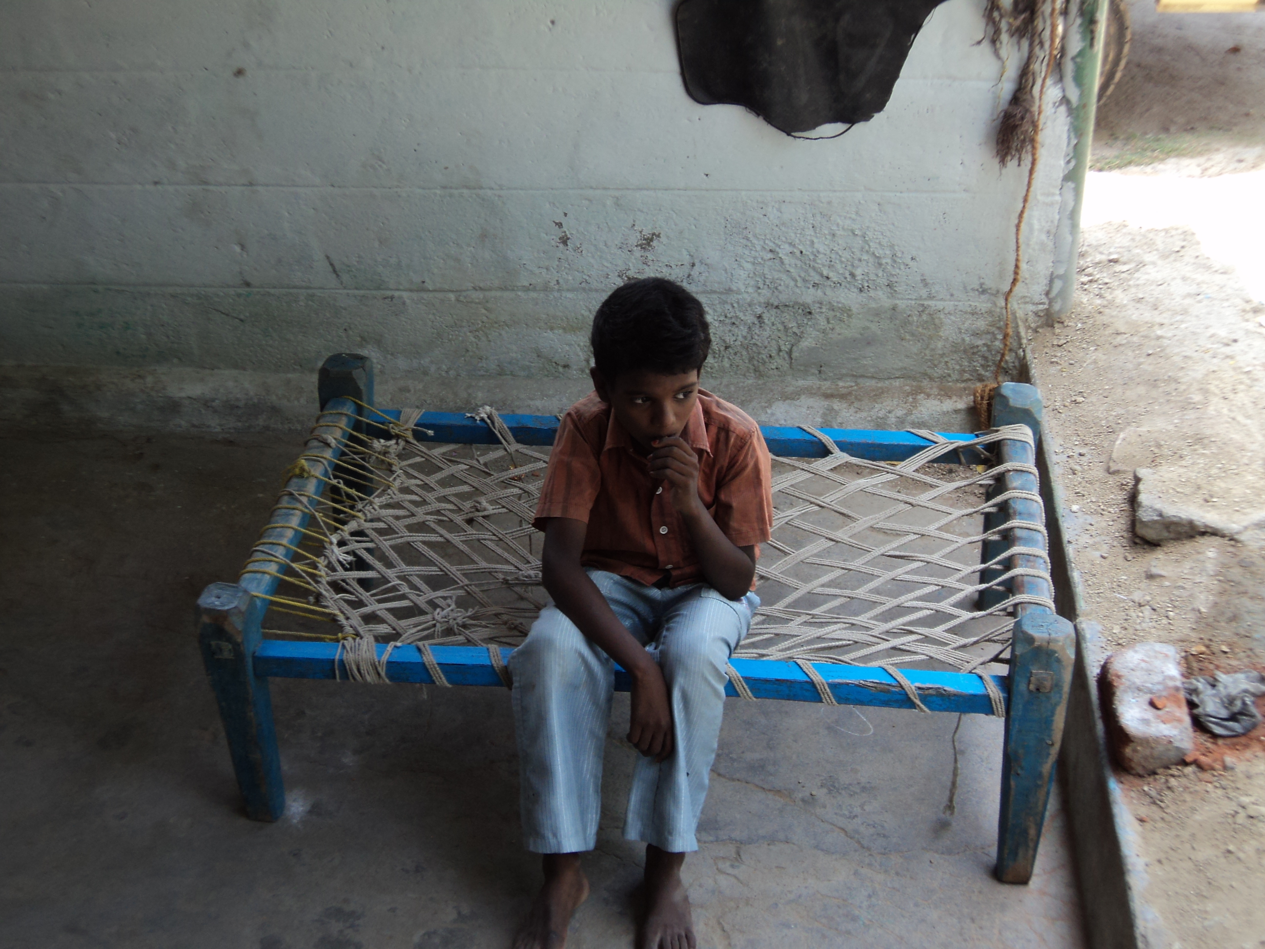 rural areas in Tamil Nadu, India.